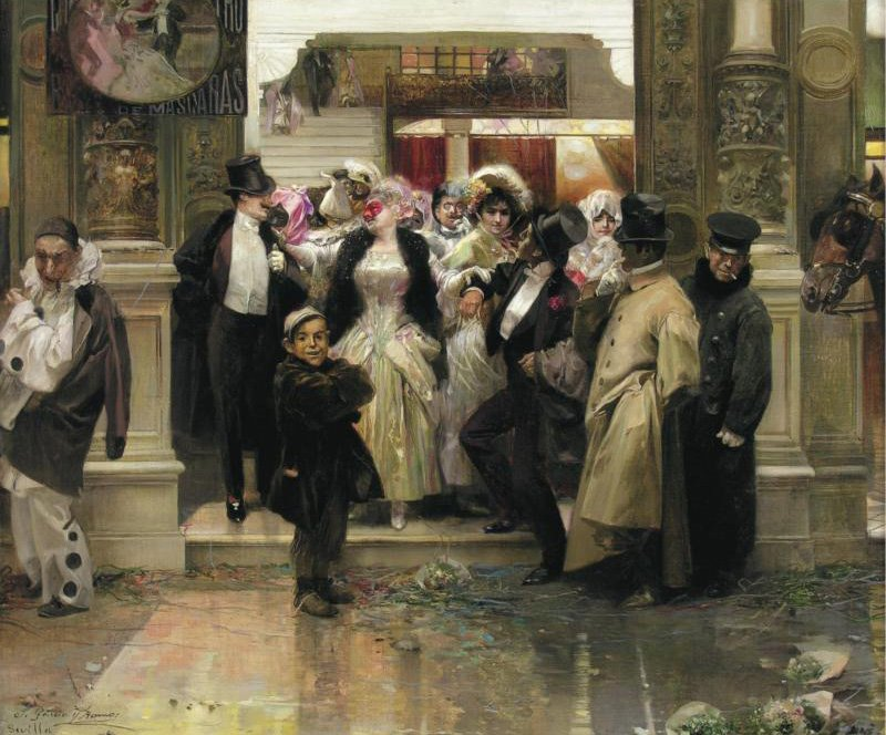 Salida de un baile de mascaras.title QS:P1476,es:"Salida de un baile de mascaras." label QS:Les,"Salida de un baile de mascaras."